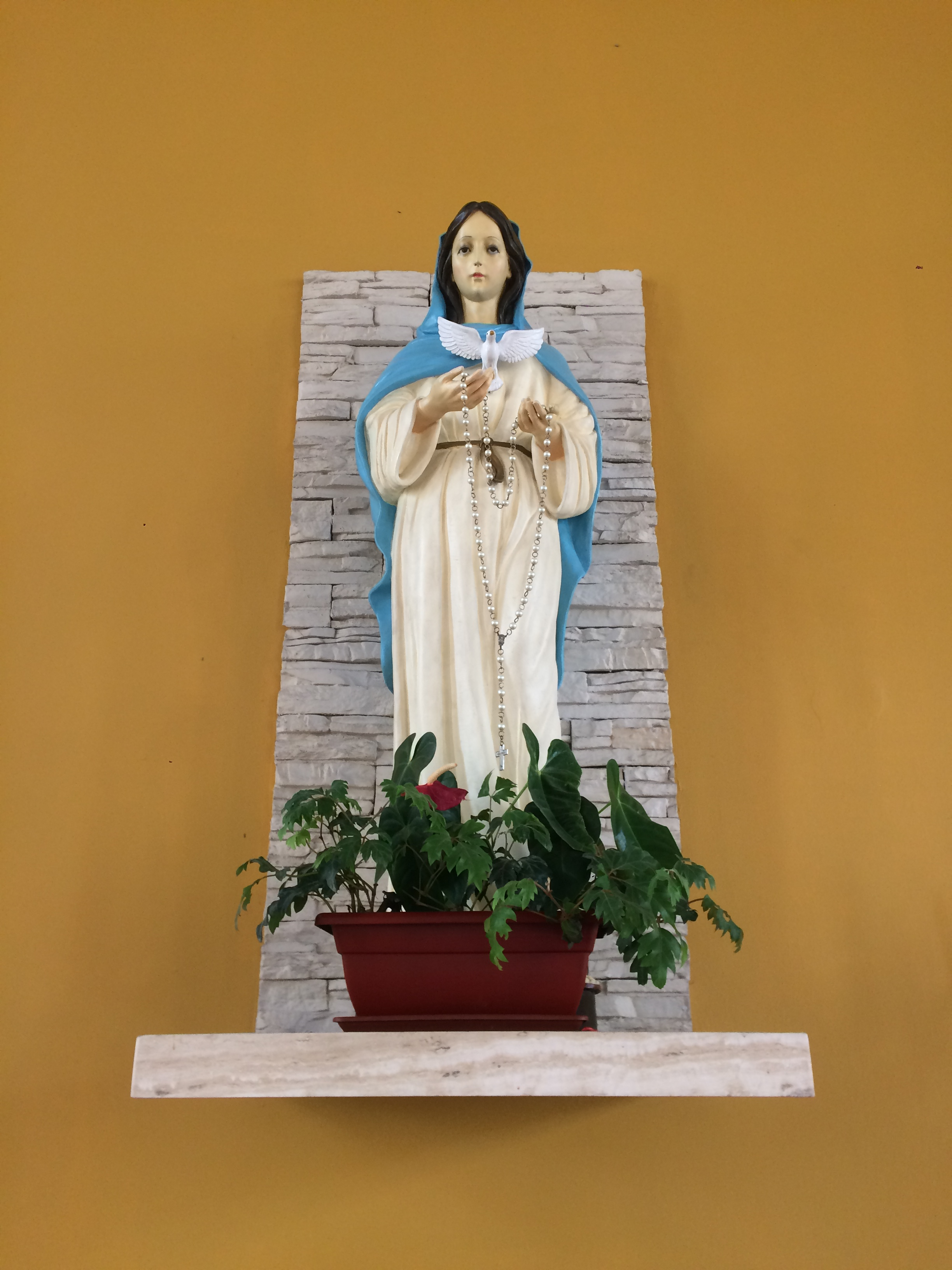 Imagen de Nuestra Señora de la Encarnación, de la Parroquia La Encarnación del Cercado de Lima (Perú).